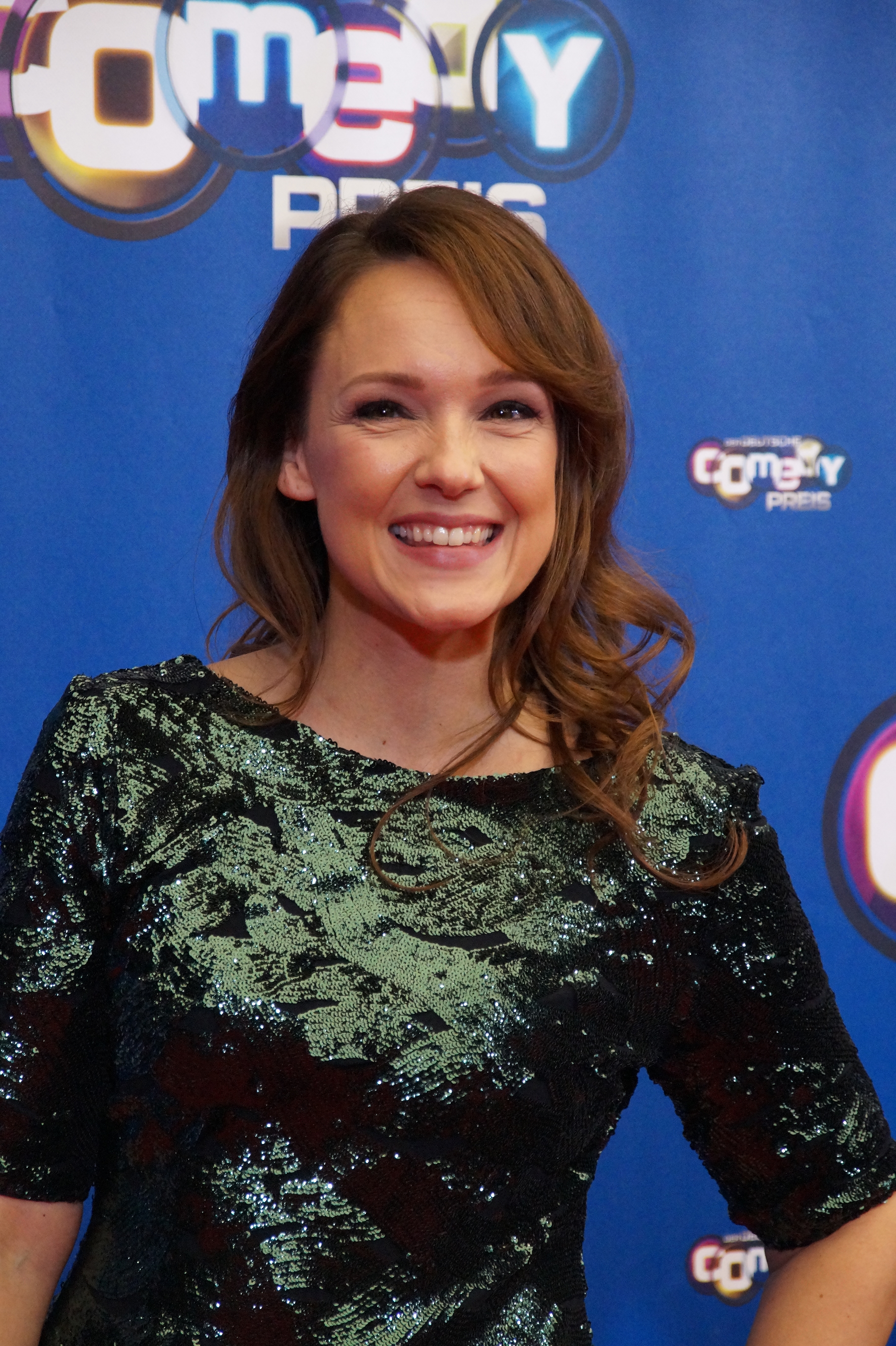 Carolin Kebekus beim Comedypreis 2016, im Oktober 2016, Köln.